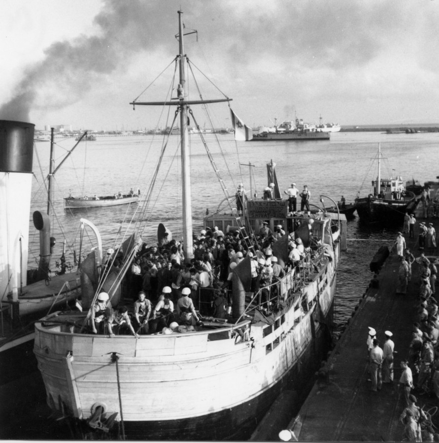 פלי"ם ספינות המעפילים ב - שיבת ציון (LUCIANA) - בנמל חיפה